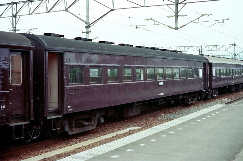 JNR Passenger car. Ohafu61-3044（国鉄、オハフ61 3044）